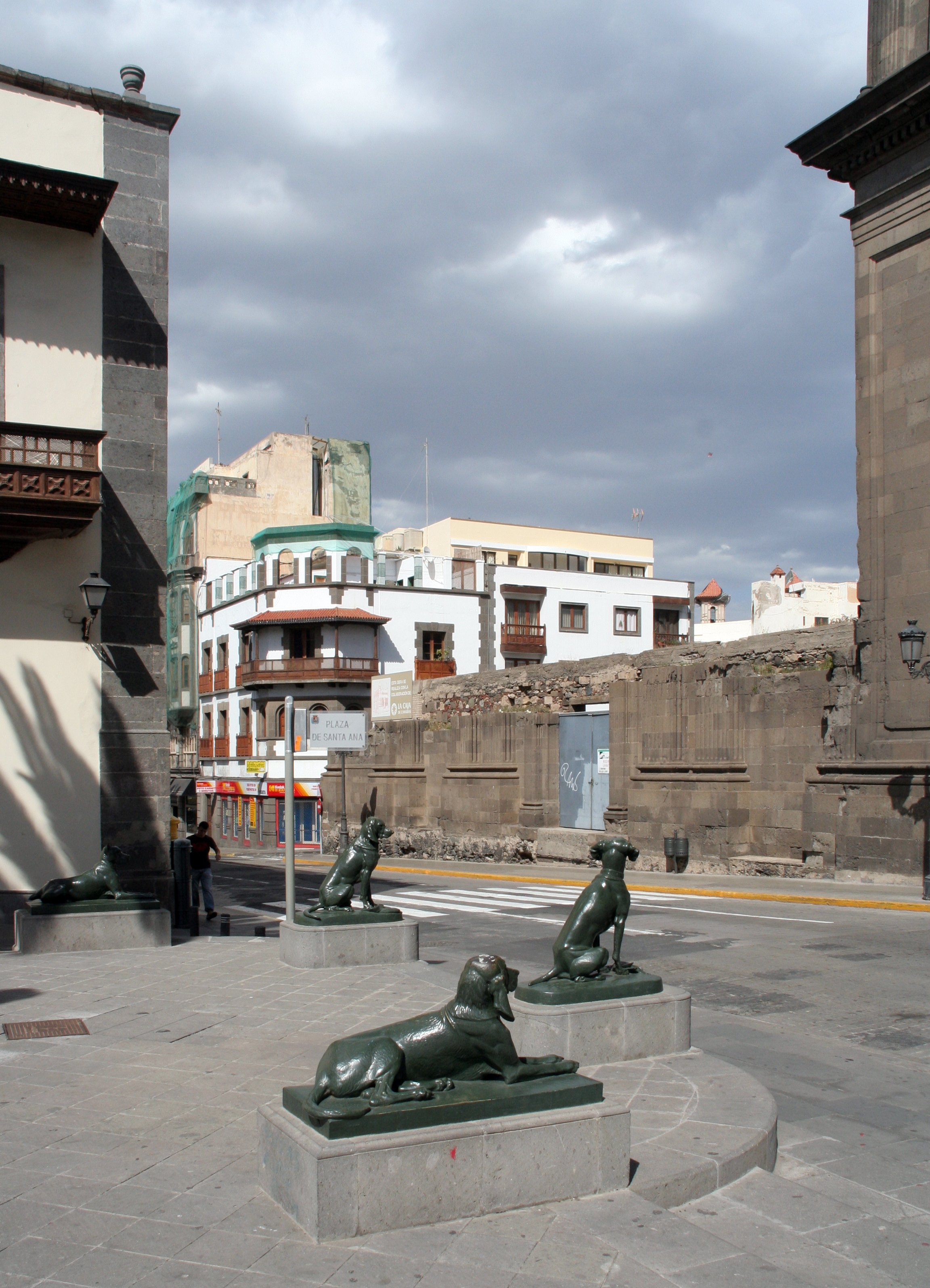 Santa Ana square 4